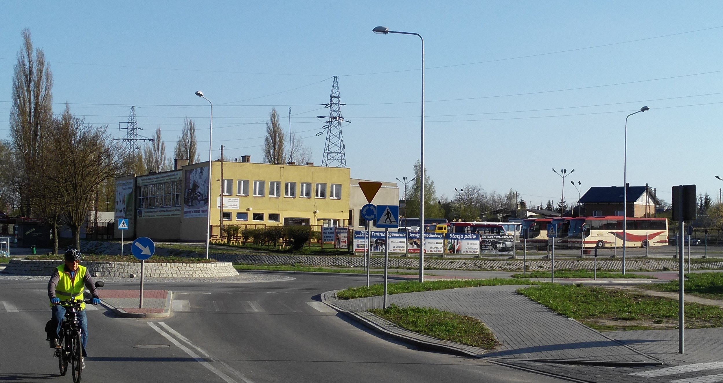 Dworzec PKS w Tomaszowie Mazowieckim w województwie łódzkim